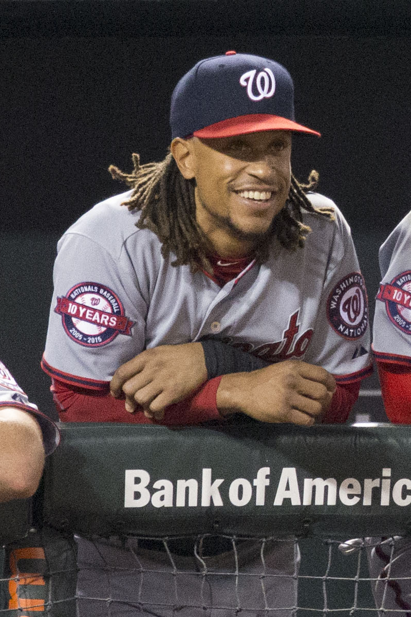 Emmanuel Burriss